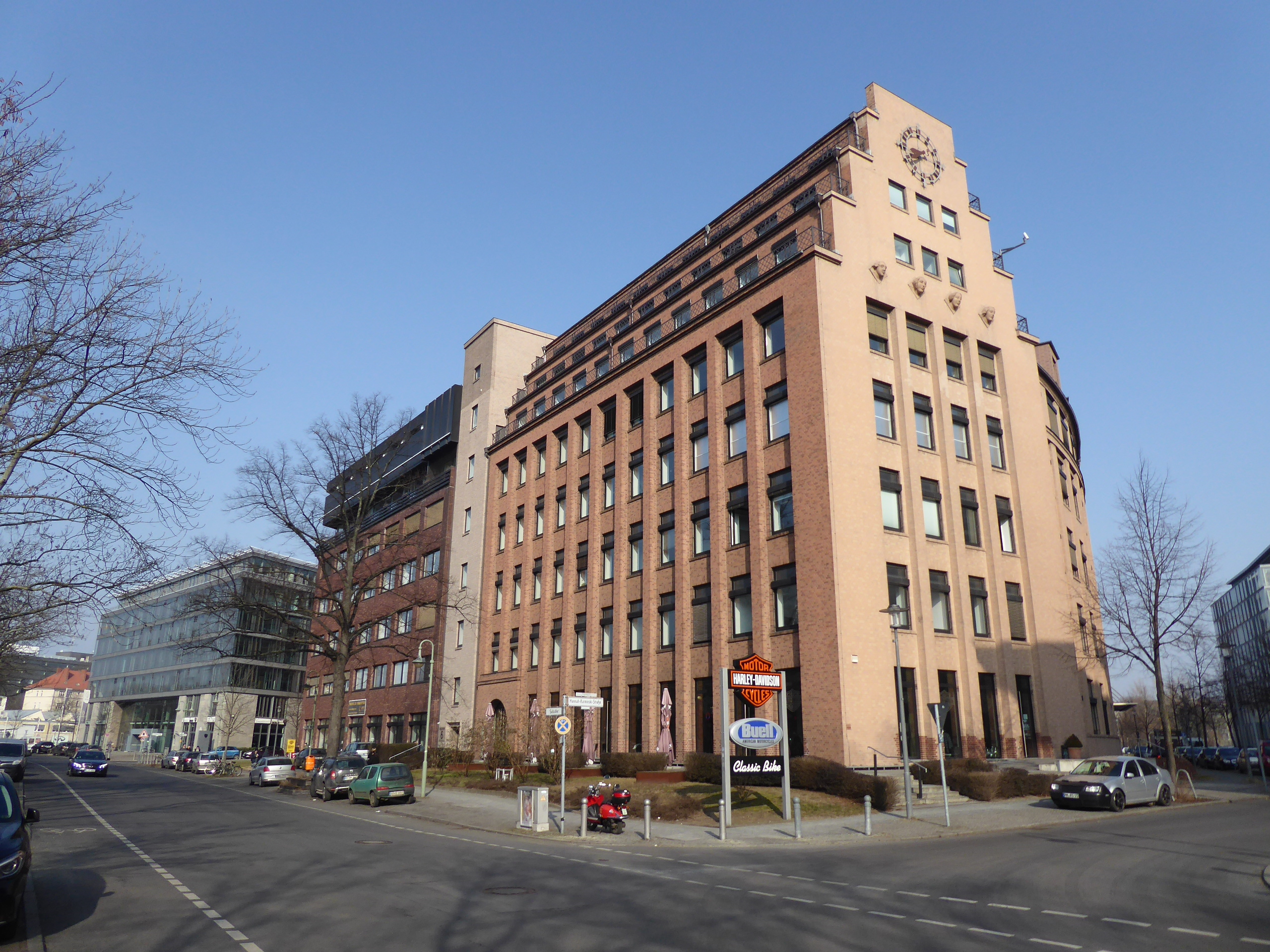 Charlottenburg Salzufer 6